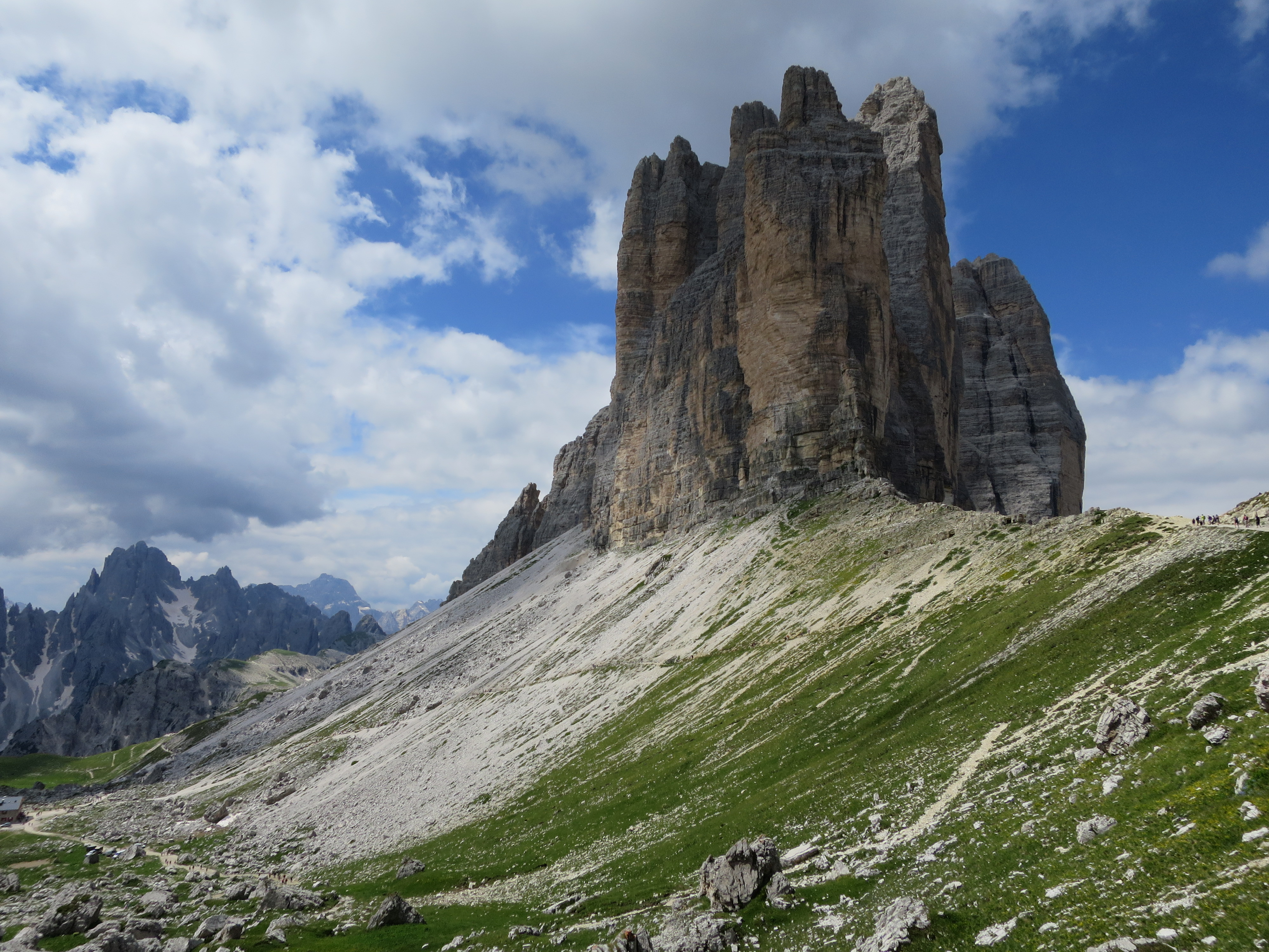 Dolomites